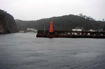 Nobushi Port, Shikine Island, Niijima, Tokyo, Jp